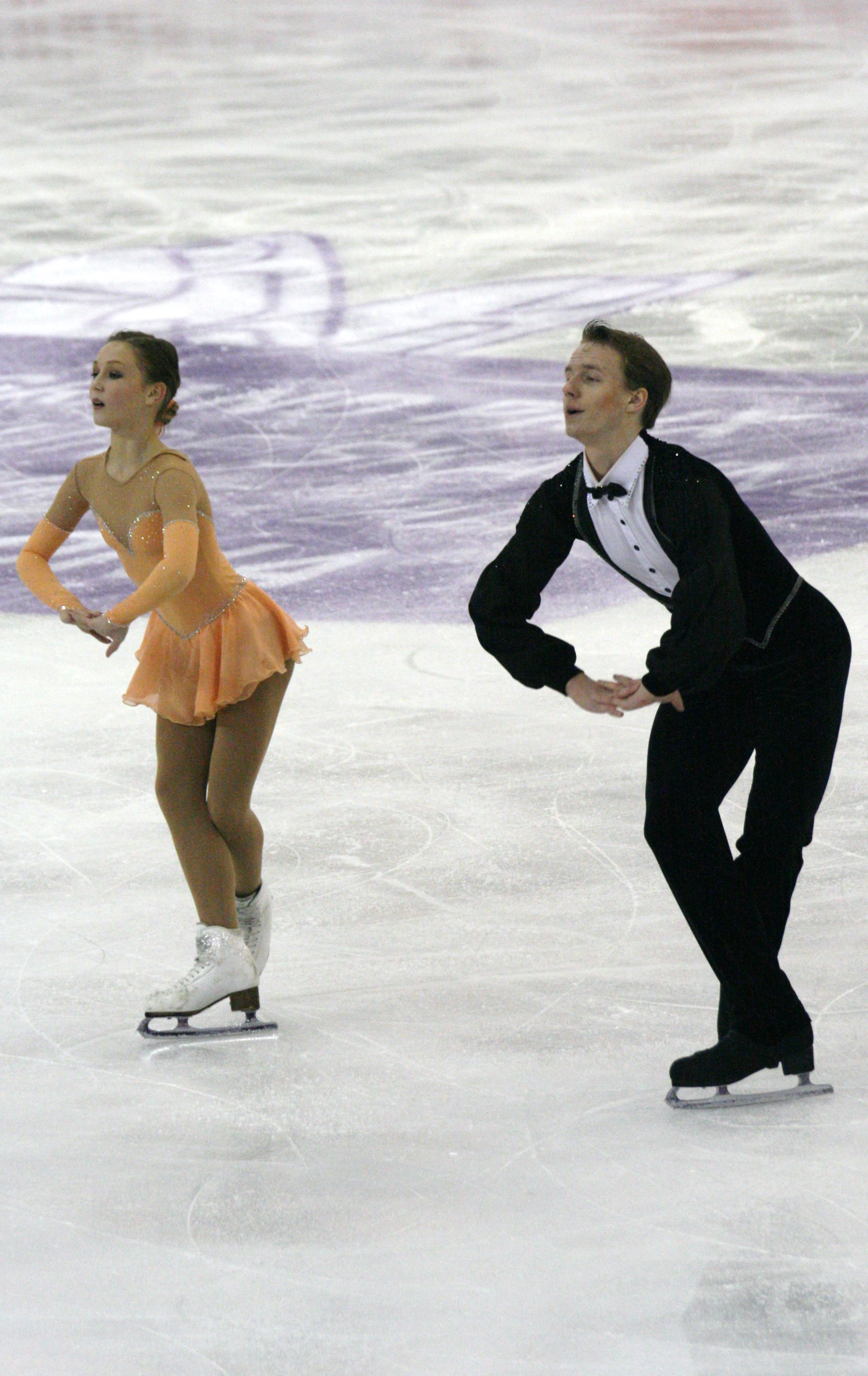 Амина Атаханова и Илья Спиридонов (Россия) на финале Гран-при по фигурному катанию среди юниоров 2015-2016.